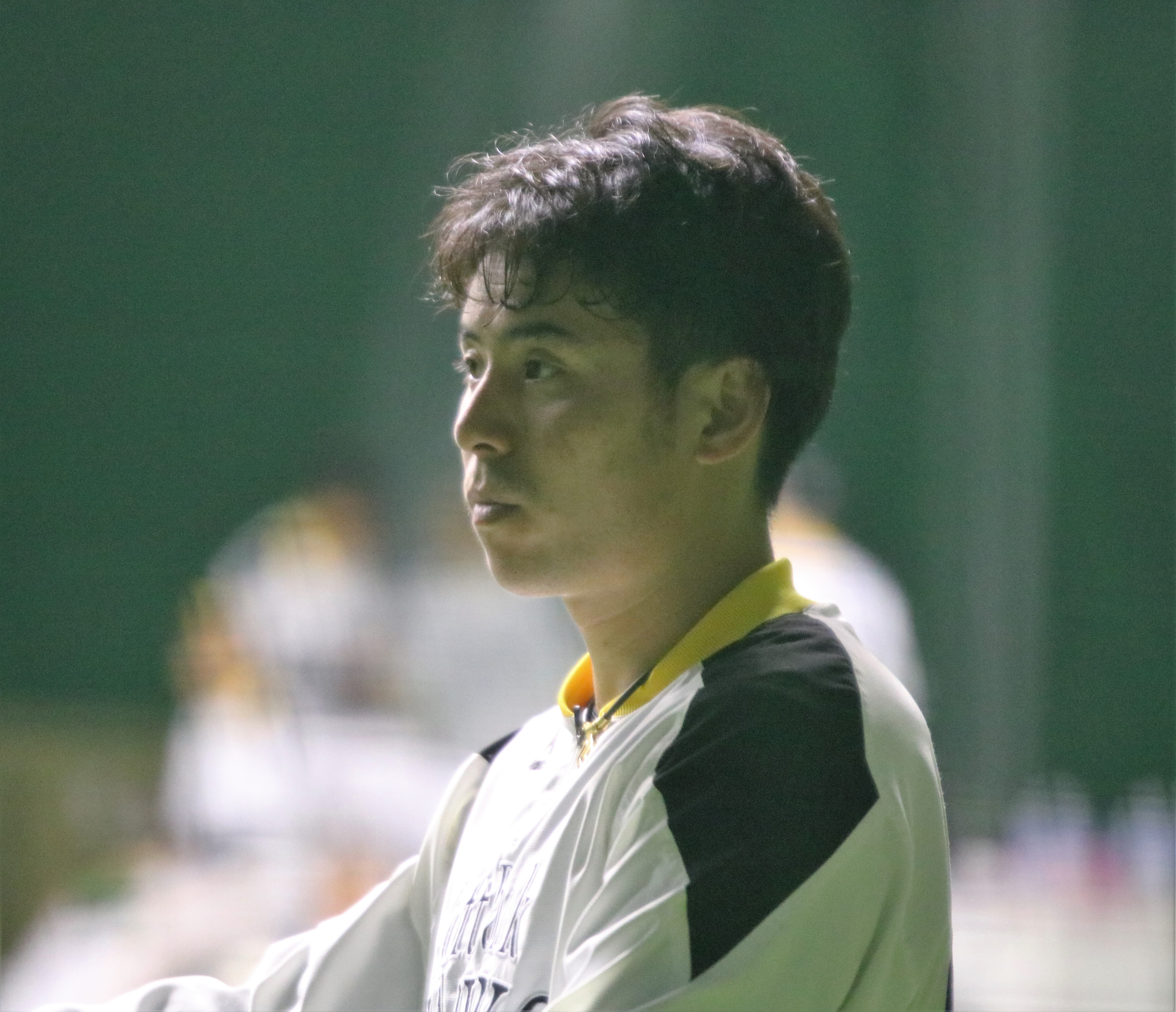 2018/4/6 タマホームスタジアム筑後 室内練習場